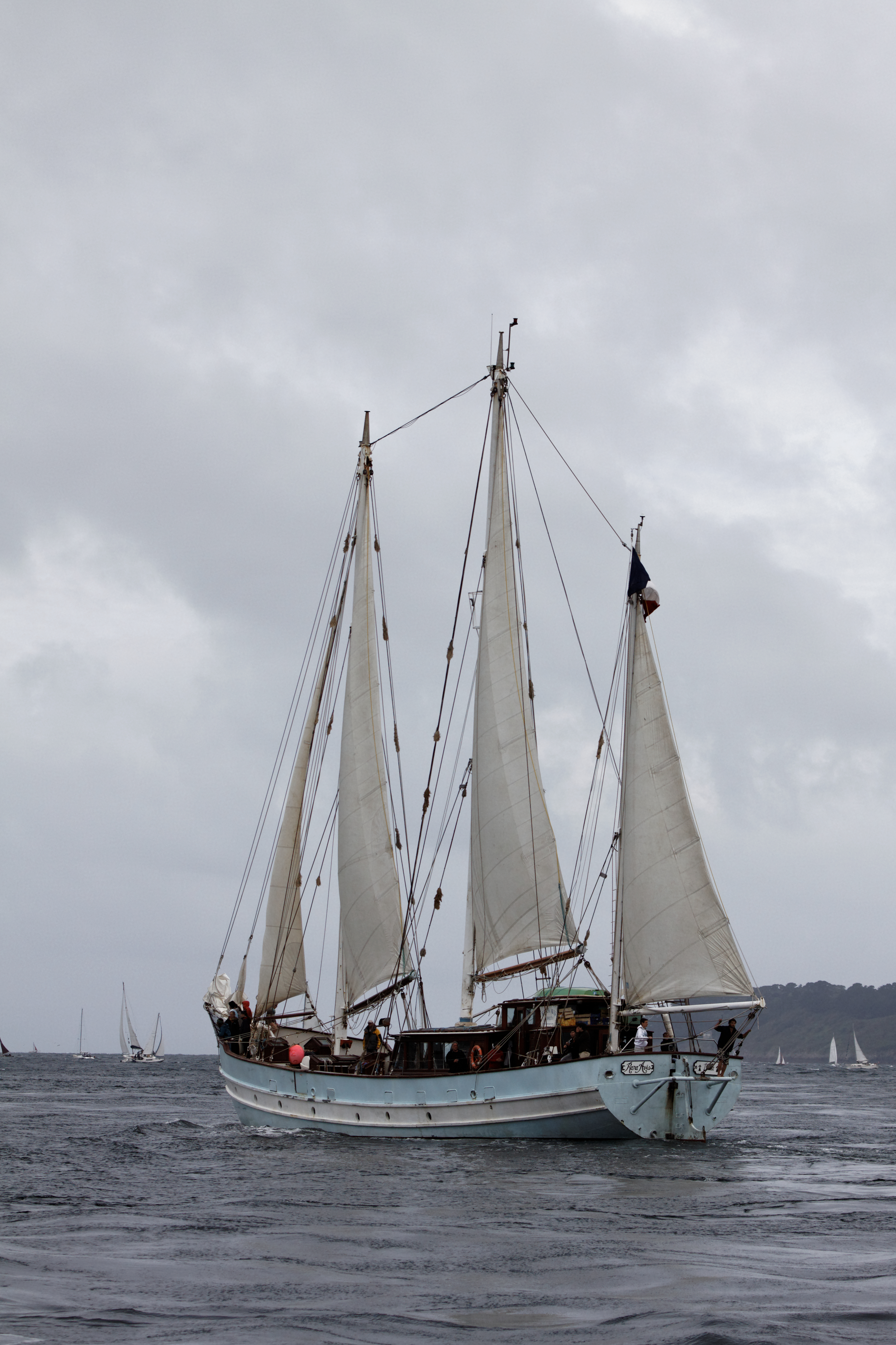 La grande parade des Tonnerres de Brest 2012 dans la rade de Brest en direction de Douarnenez.